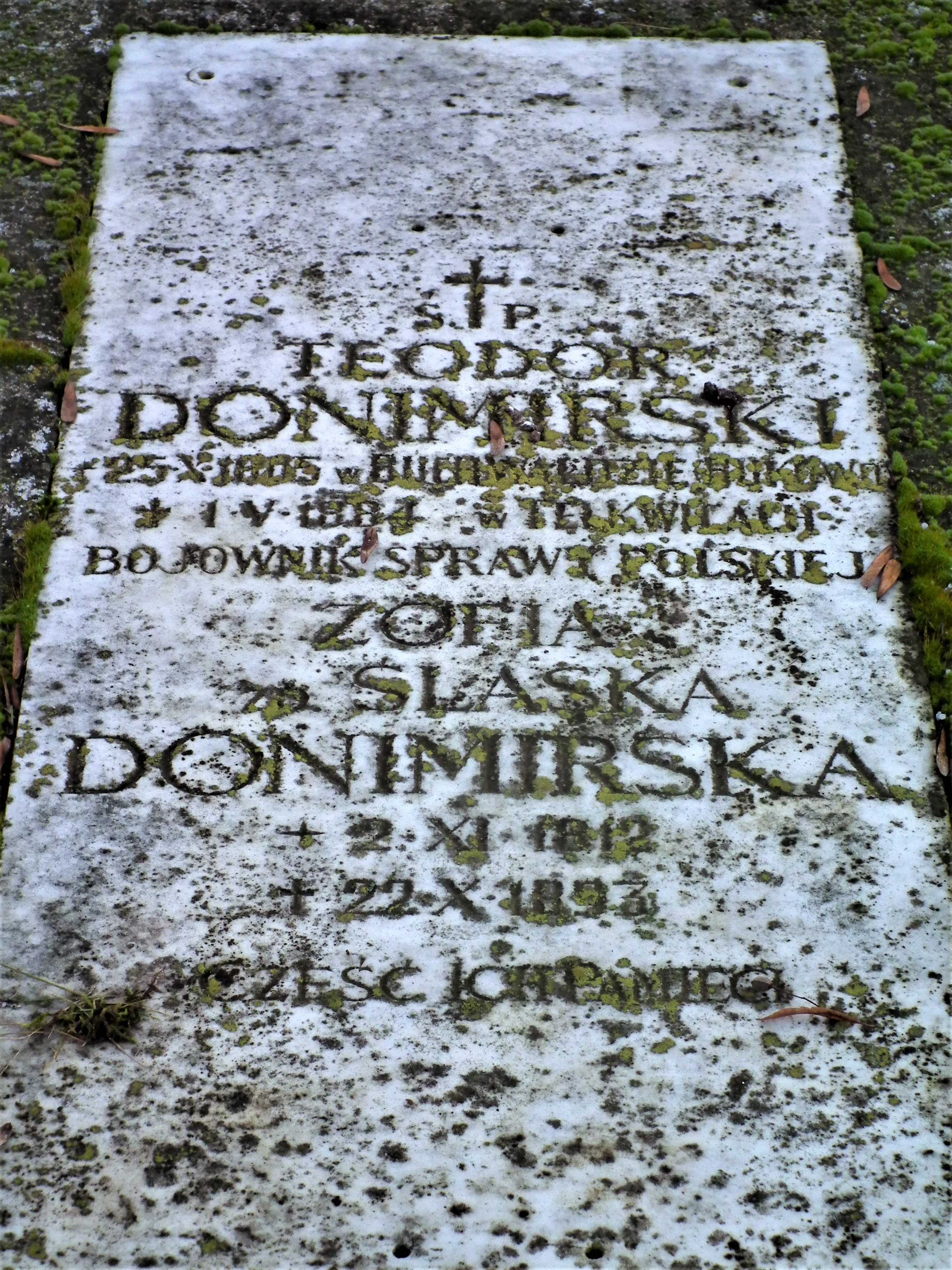 Kościół św. Marii Magdaleny w Kalwie. Teodor Donimirski - grób.